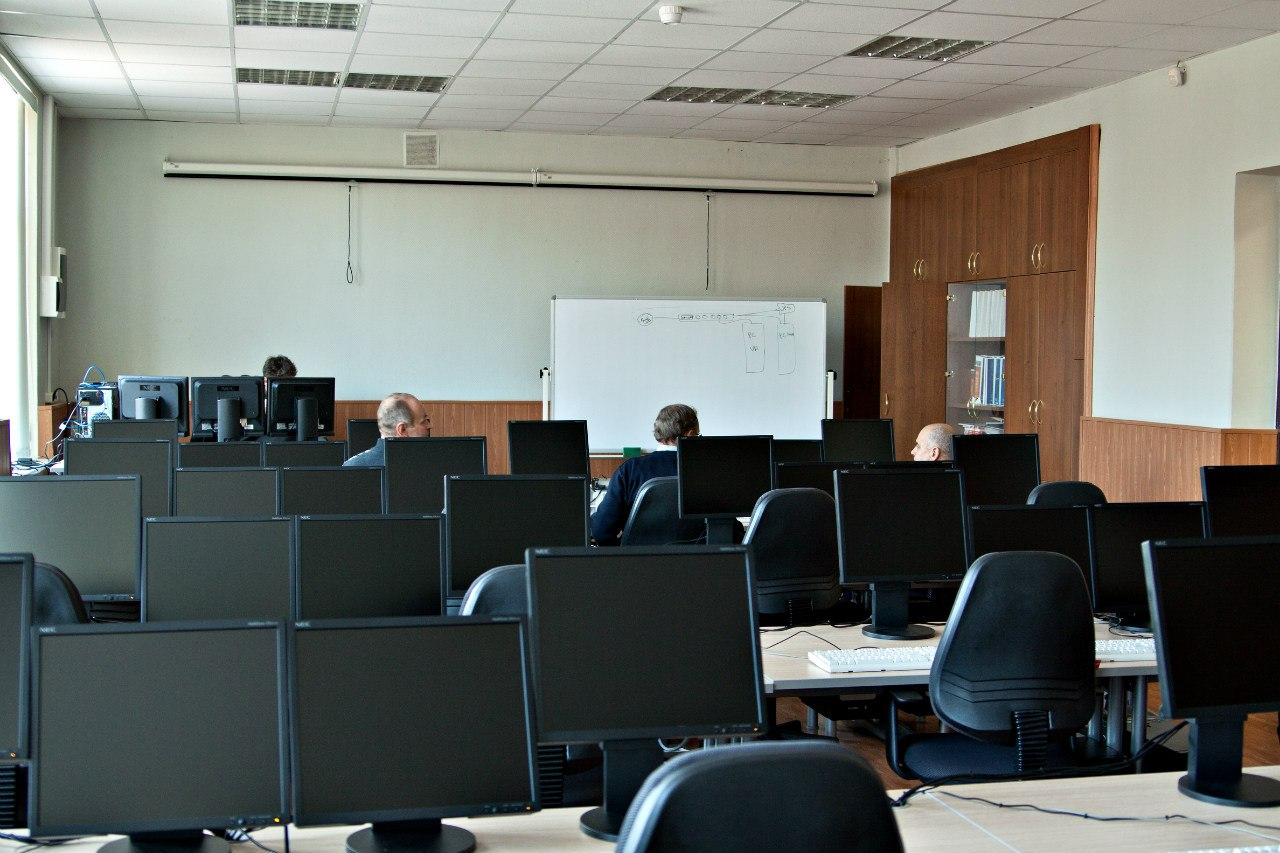 Новейшее оборудование в учебных классах